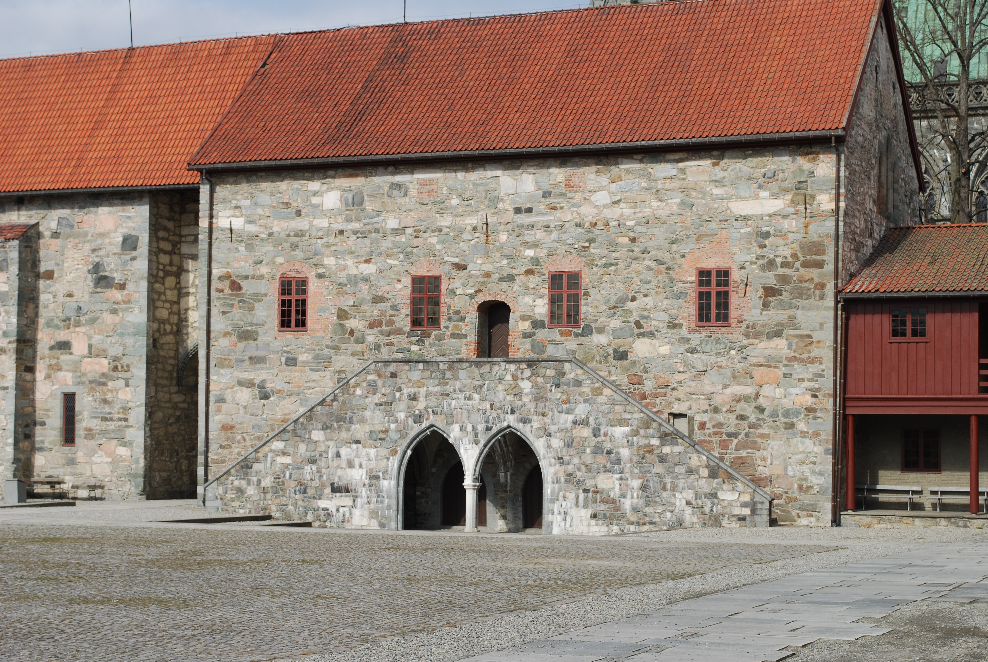 Erkebispegården i Trondheim.